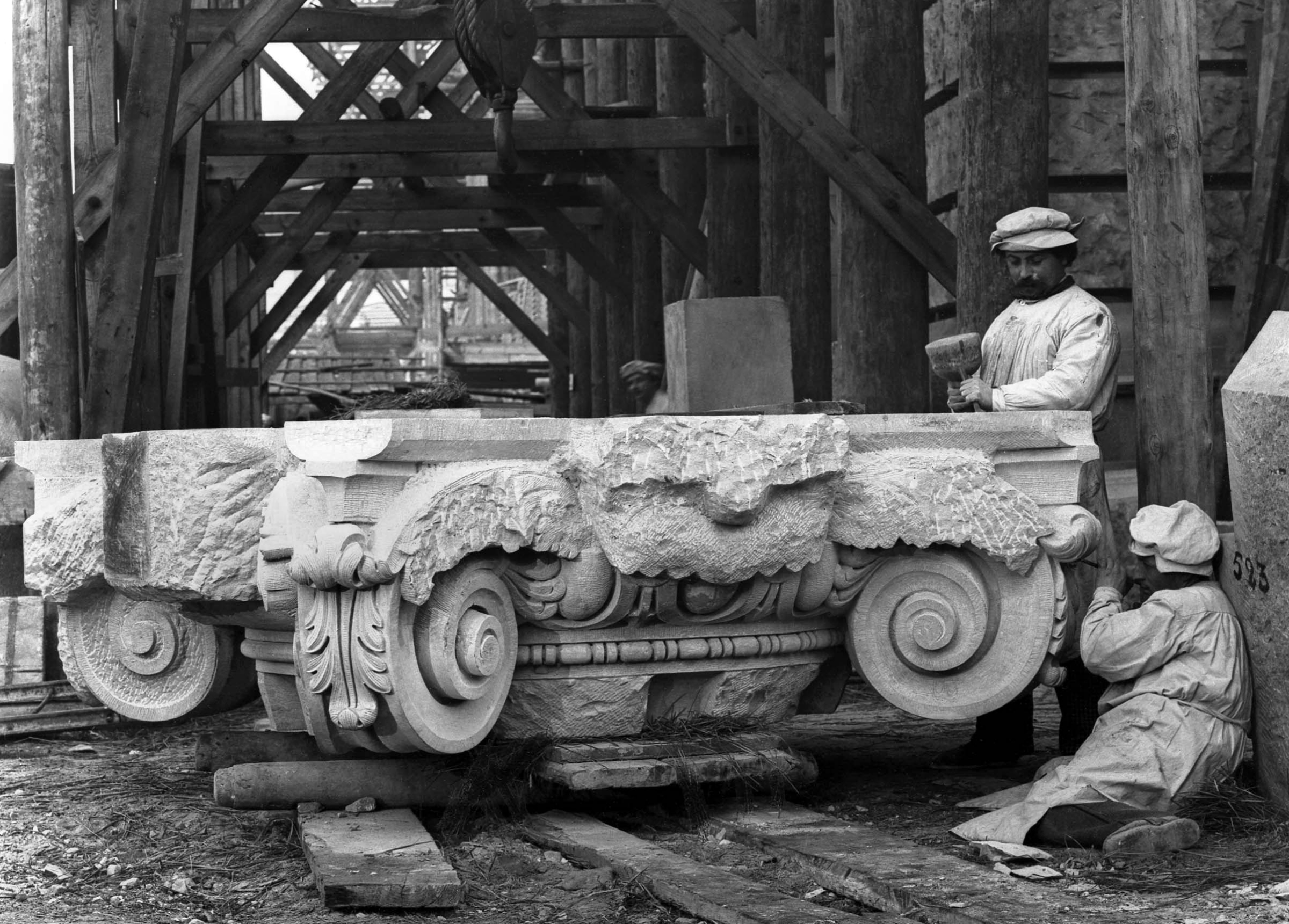 Steinmetze bearbeiten Fassadenteile für das Reichstagsgebäude.